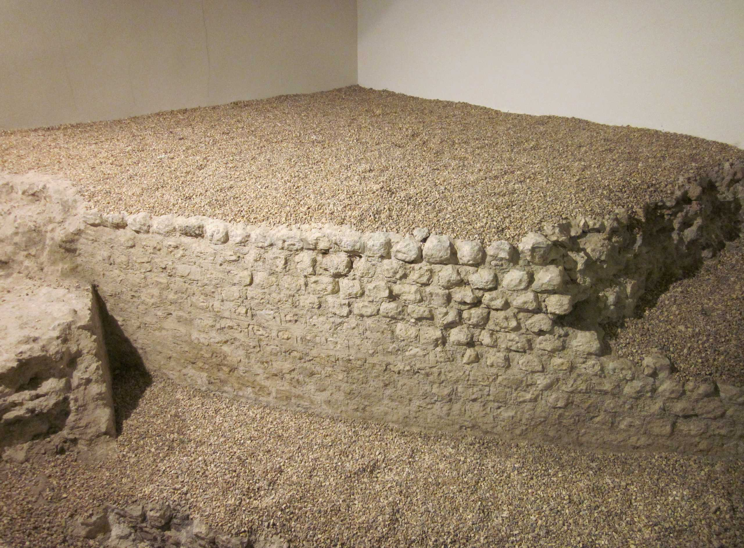 vestige de la cella du temple gallo-romain de Tours